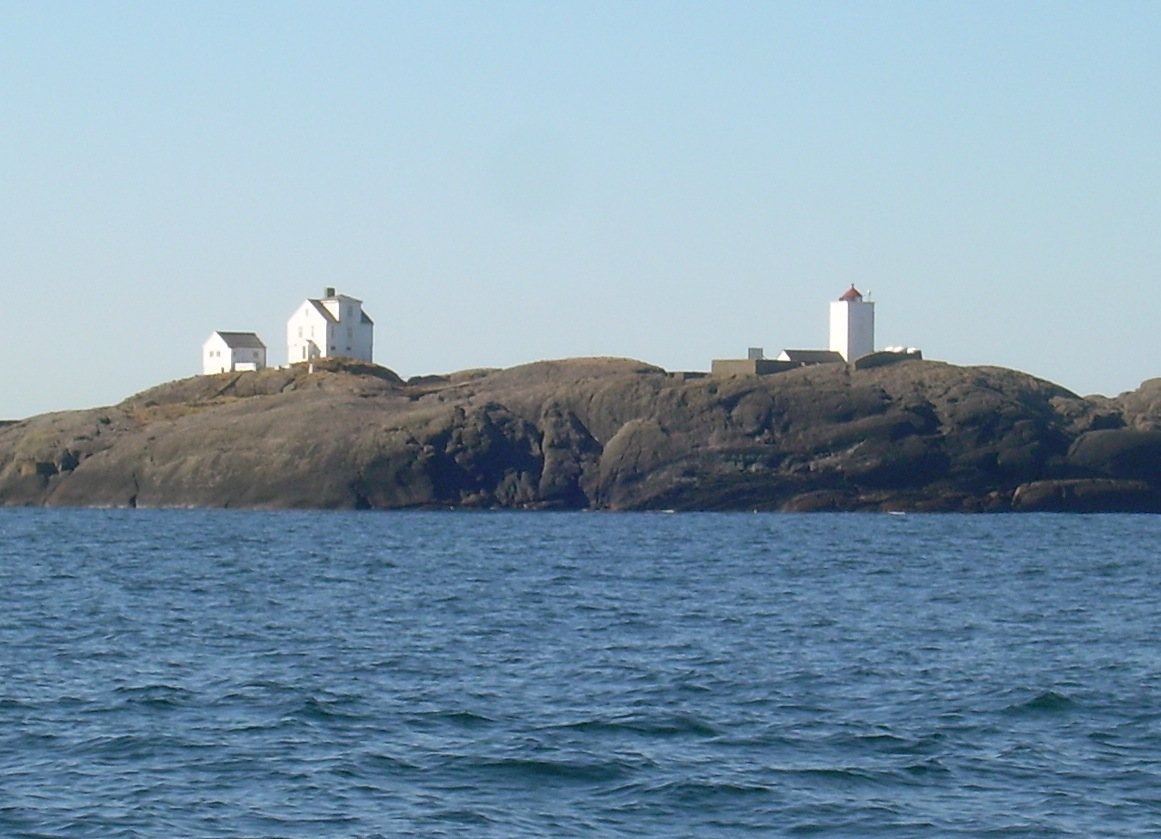 Holmengrå Fyr